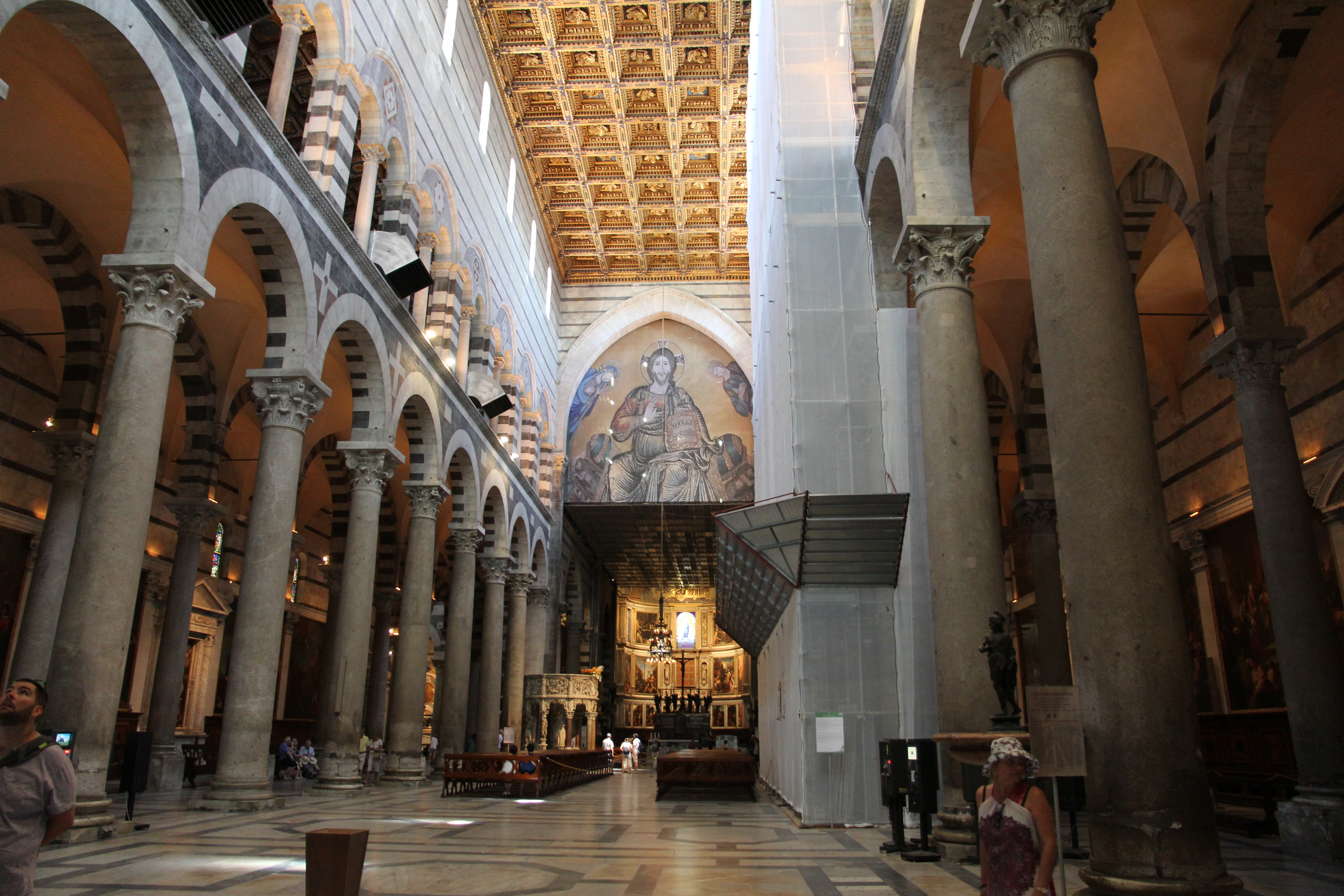 Pisa, cattedrale di Santa Maria Assunta